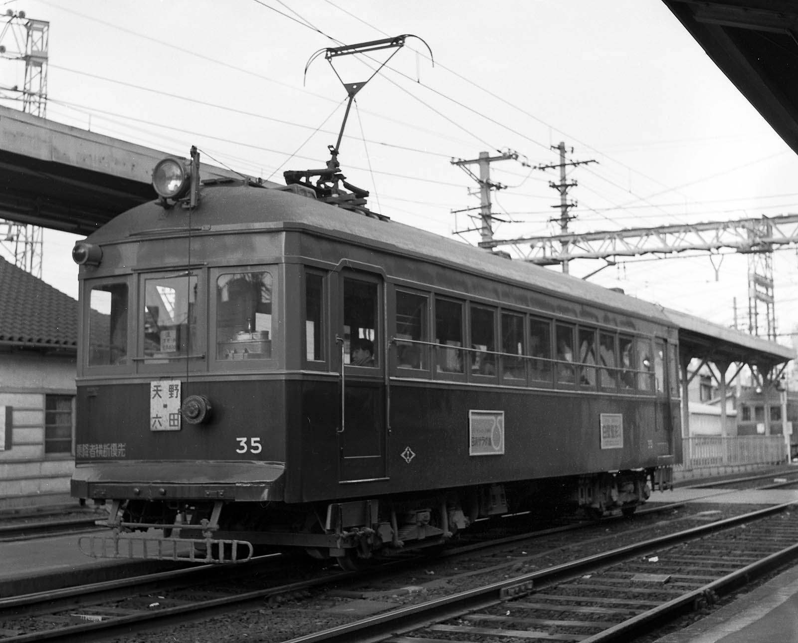 阪神31形電車35 阪神野田駅北大阪線ホームにて。1974年撮影。